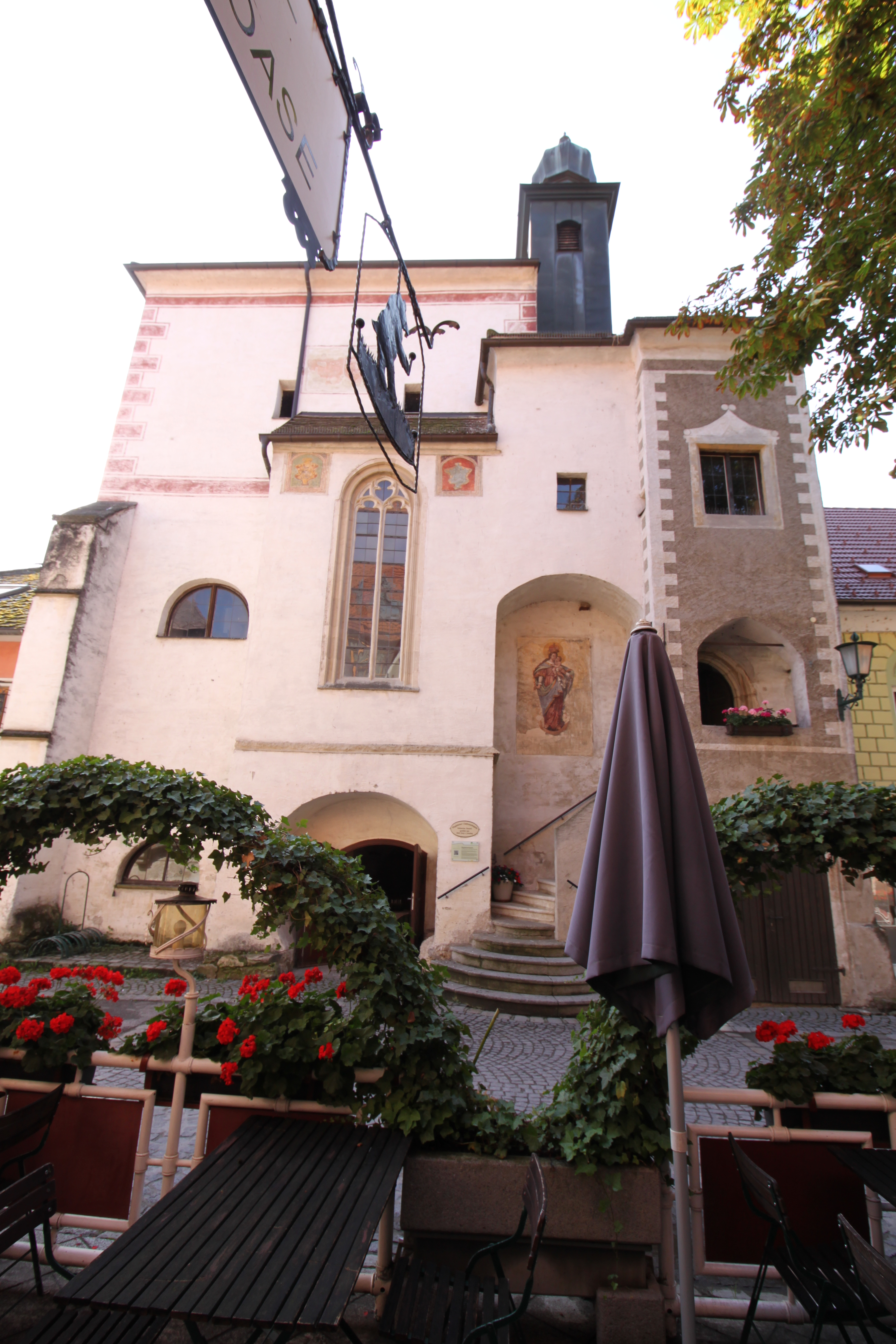 Kapelle hl. Maria Magdalena, Marktkapelle Emmersdorf, nördliche reich gegliederte Straßenfront, links Strebepfeiler, dann Eingang in das Souterain, vorgelegte Halbrundtreppe, dann anfangs gedrehter längsseitiger Treppenaufgang mit loggiaartigen Schlusspodest. Fresko Maria mit Kind in einer tonnengewölbten Nische über dem Stiegenaufgang.